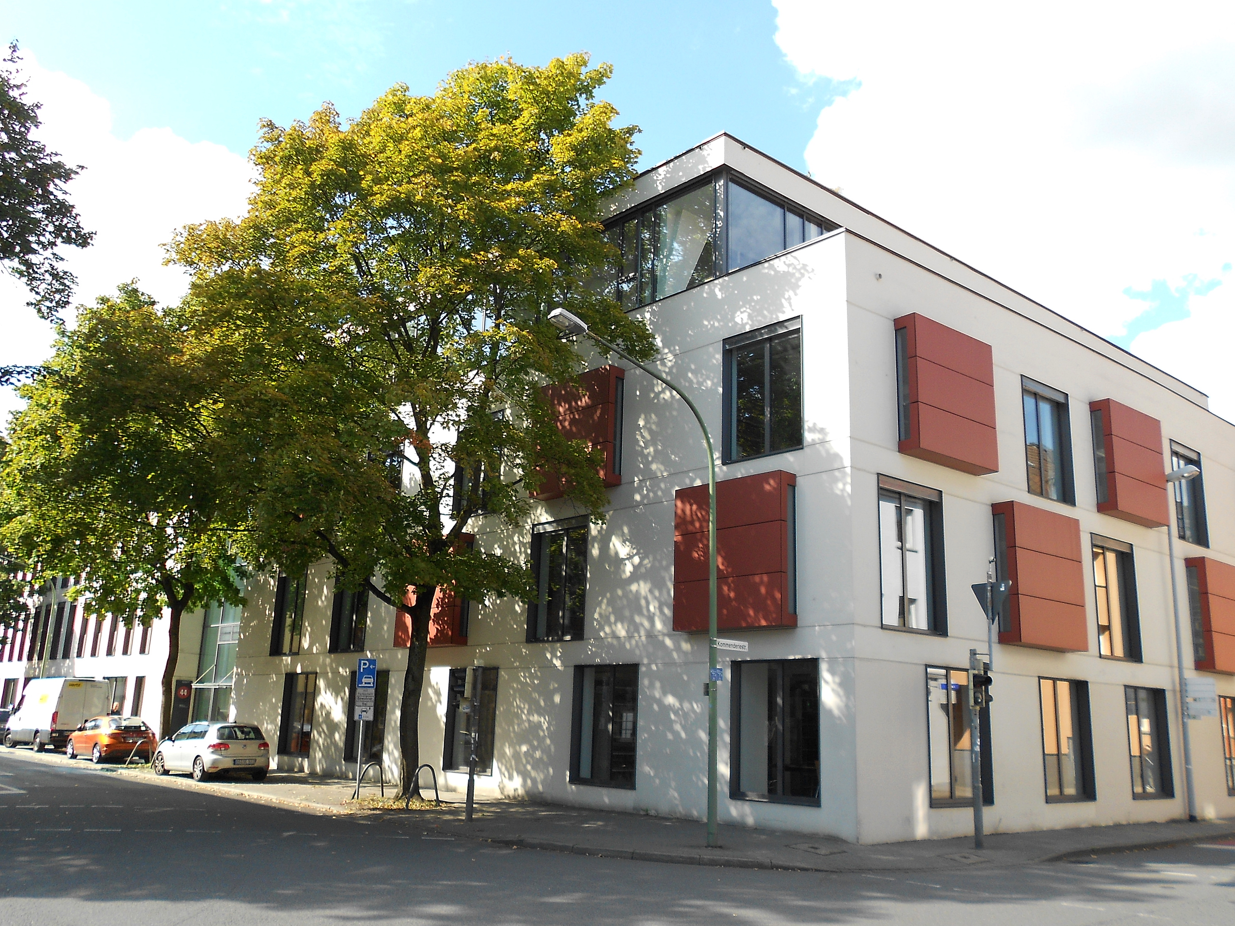 European Legal Studies Institute der Universität Osnabrück und ELSI-Forschungsbibliothek in der Osnabrücker Innenstadt